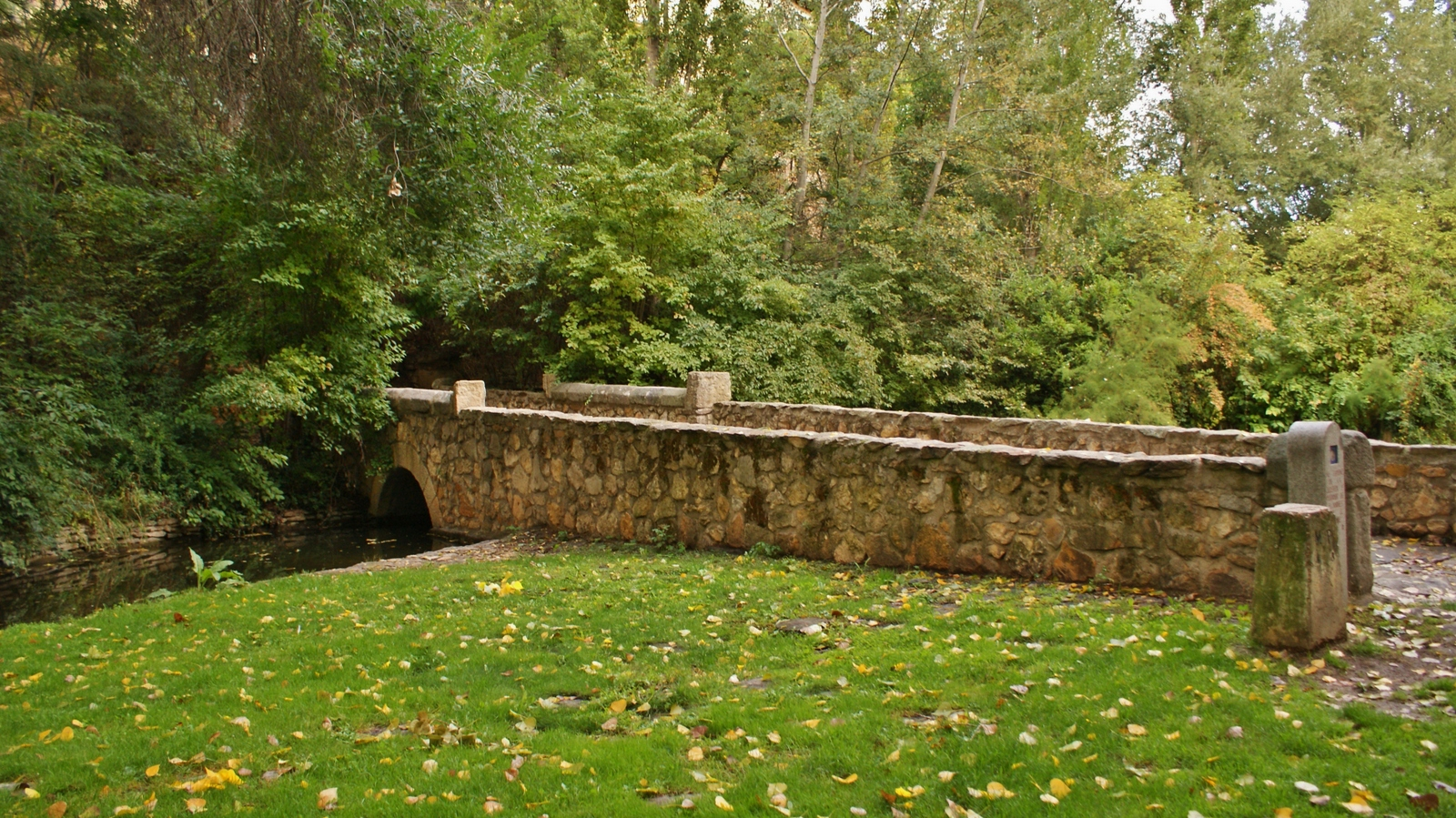 Vega del Río Clamores, ciudad de Segovia, Comunidad de Castilla y León.